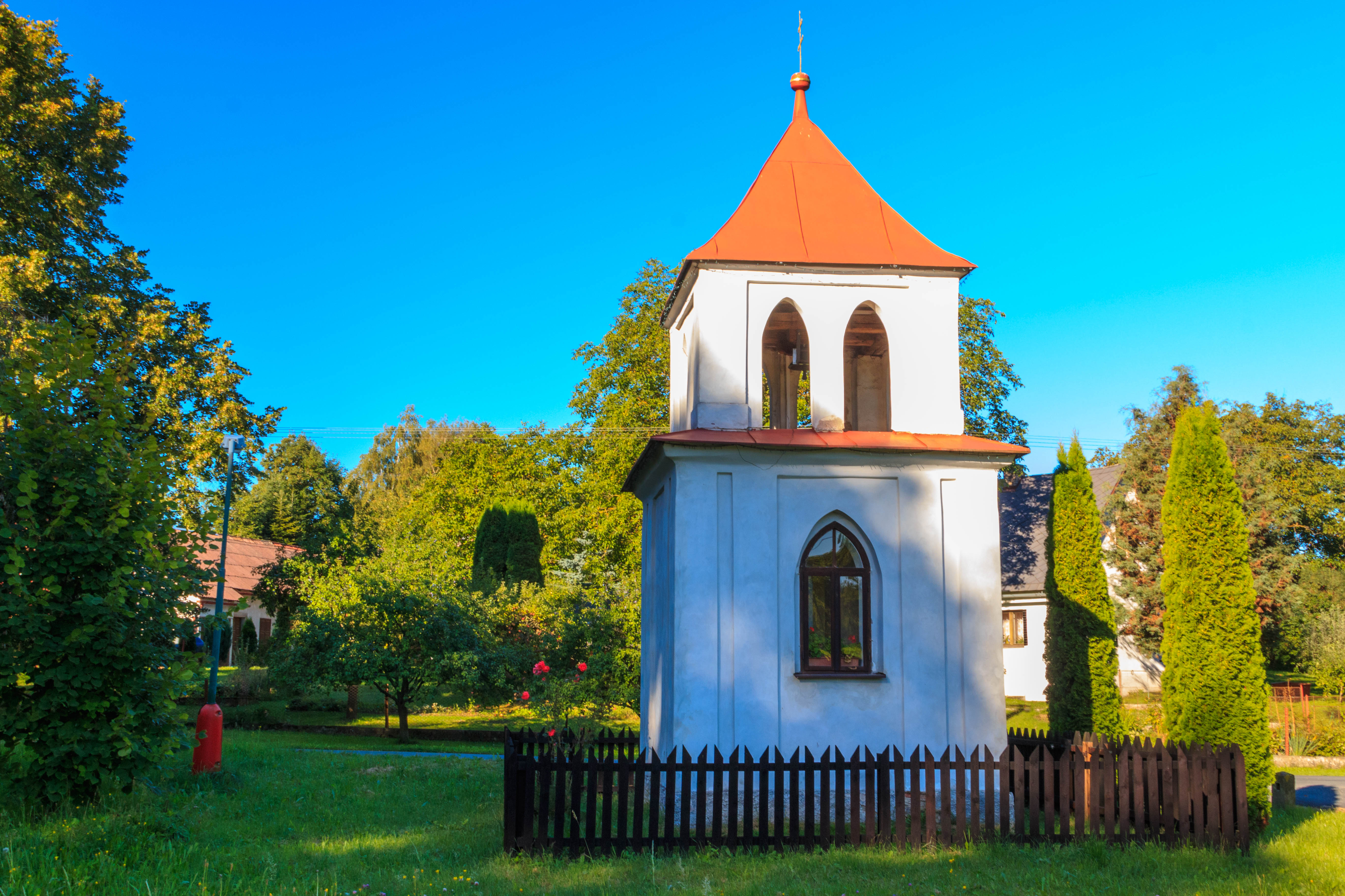 Víckovice - kaplička